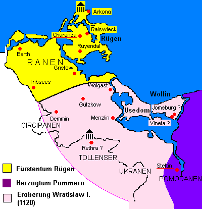 Vorpommern um 1150